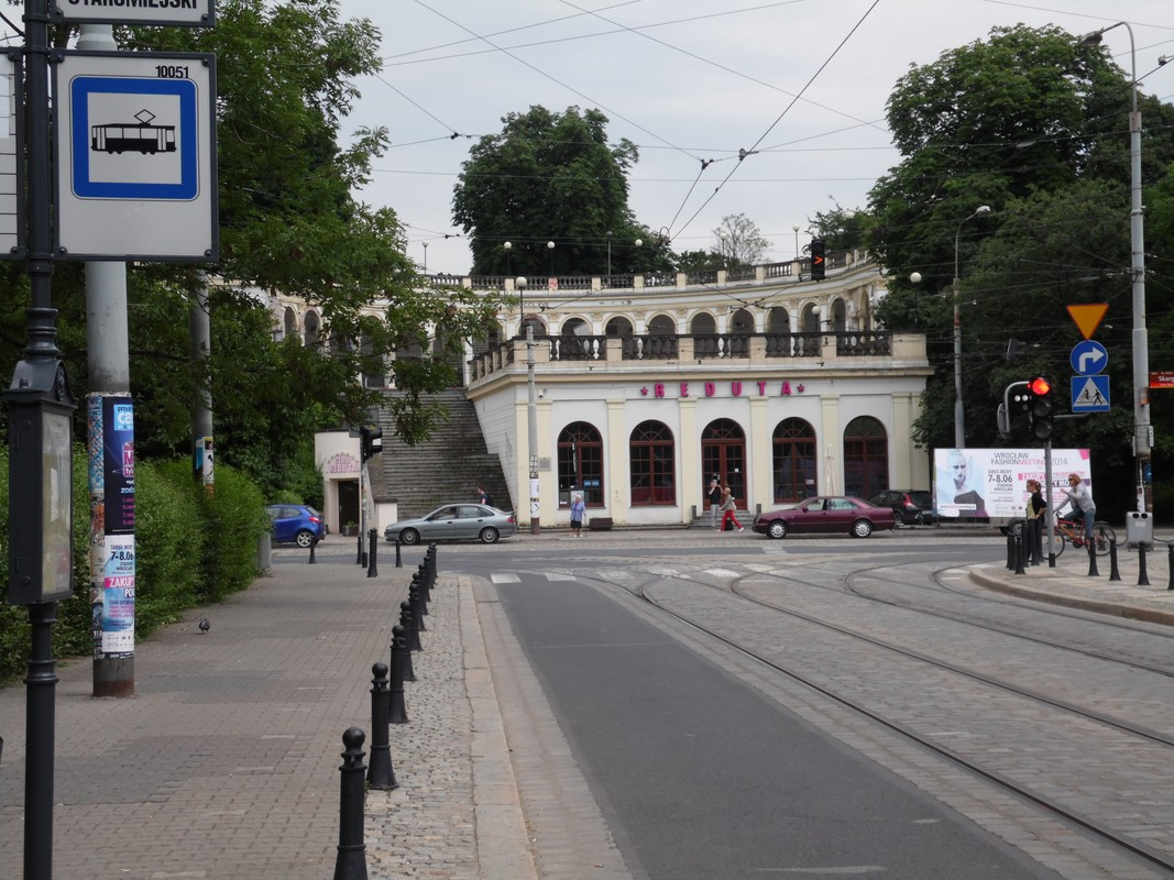 REDUTA.